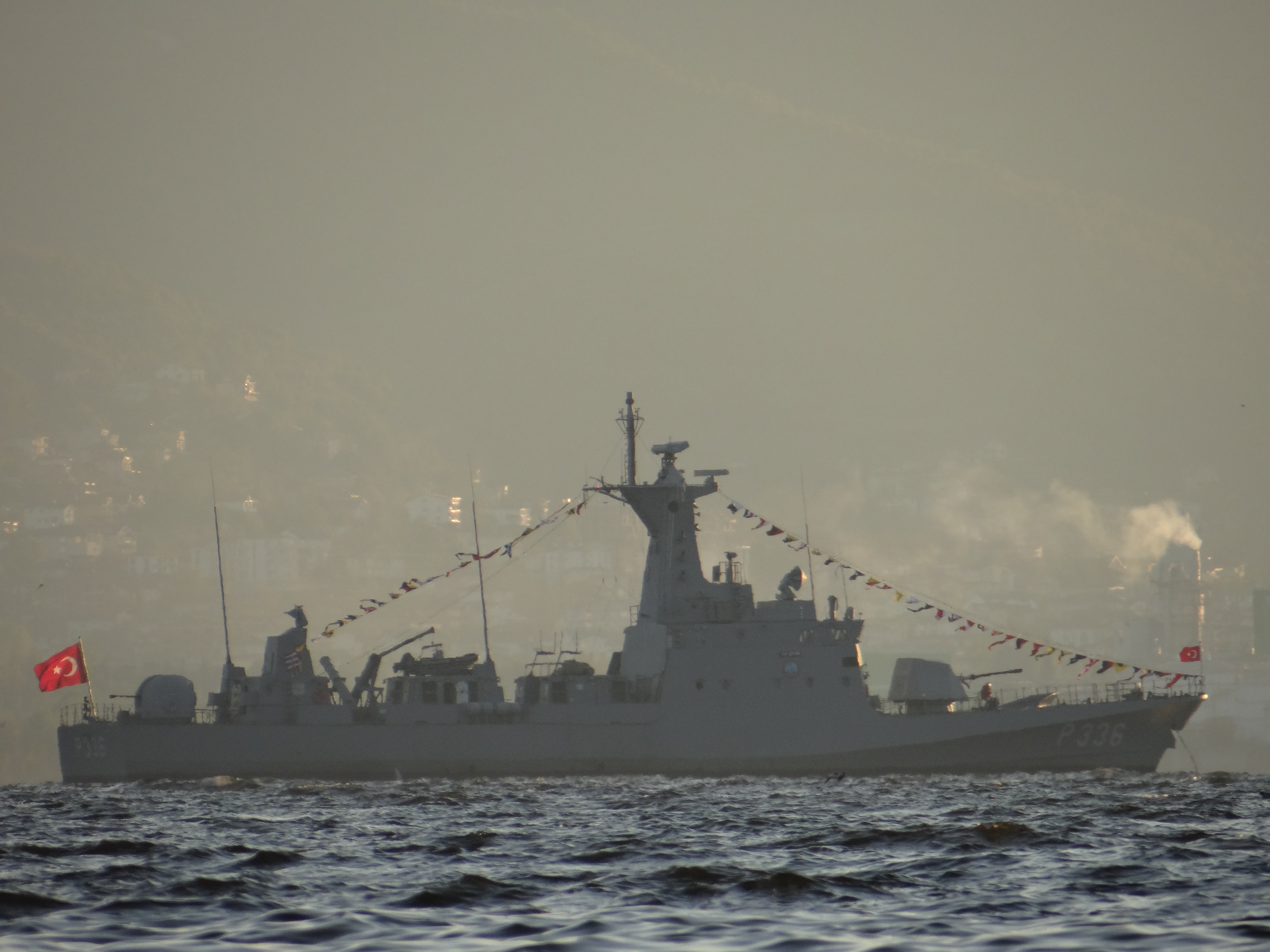 TCG P-336 Zıpkın 20171029